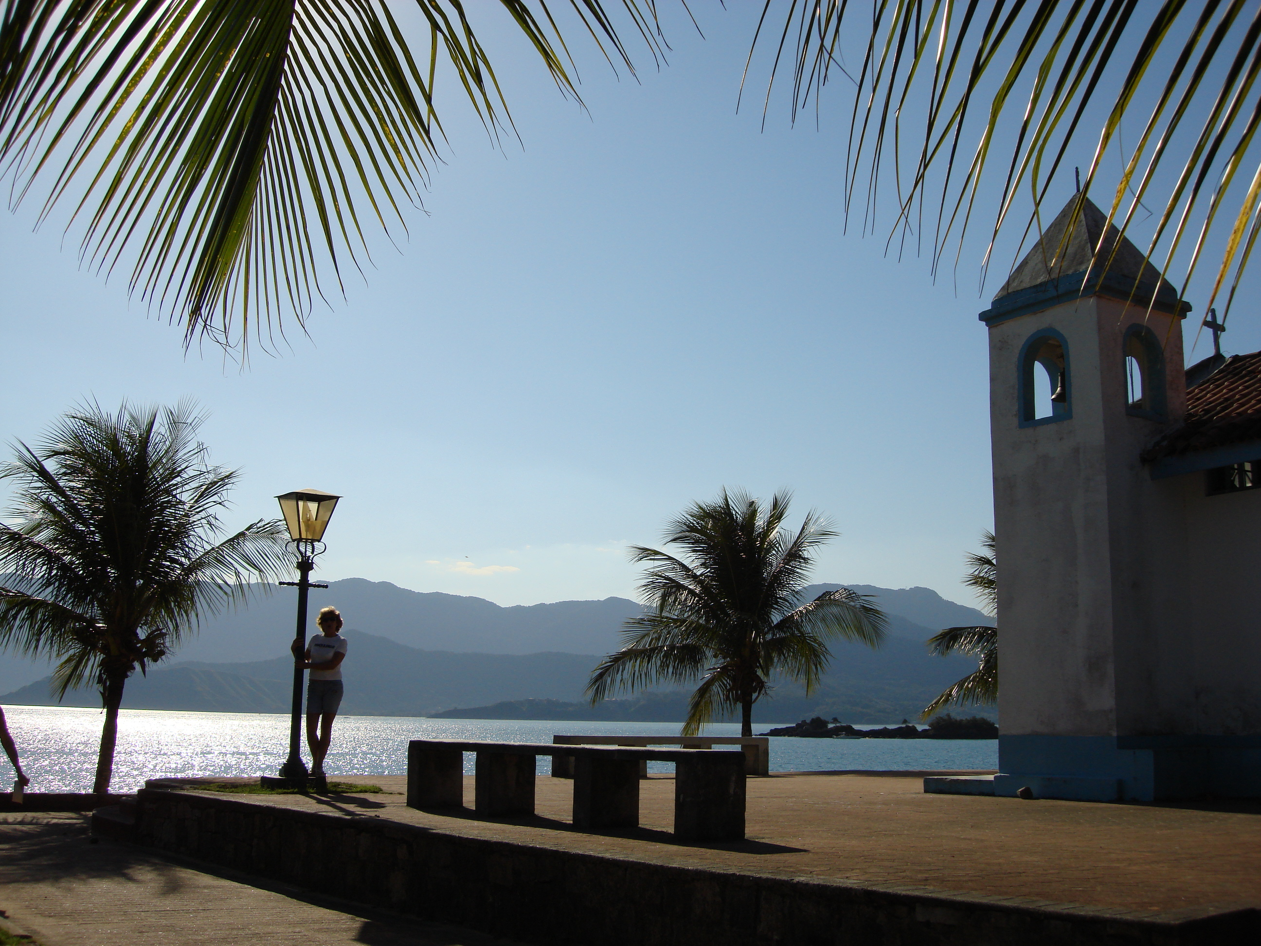 Ilha Bela, São Paulo, Brasil